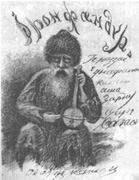 Kovrilo de la "Oseta Liro" fare de Kosta Ĥetagurov. Unua eldono.